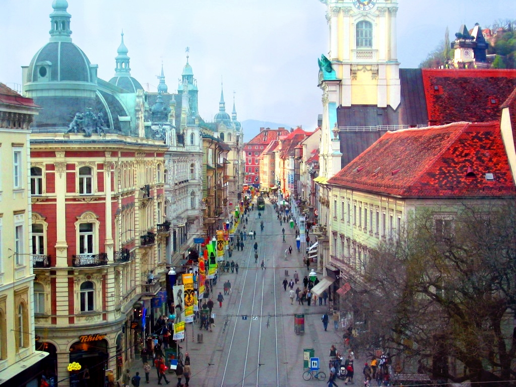 Blick vom Marienlift in die Herrengasse (Graz) 15:36, 9. Apr 2006 Chri17 1024 x 768 (273686 Byte) (* Bildbeschreibung: Blick vom Marienlift in die Herrengasse * Quelle: selbst fotografiert * Fotograf/Zeichner: ~~~ * Datum: 22.4.2003 * Sonstiges: )